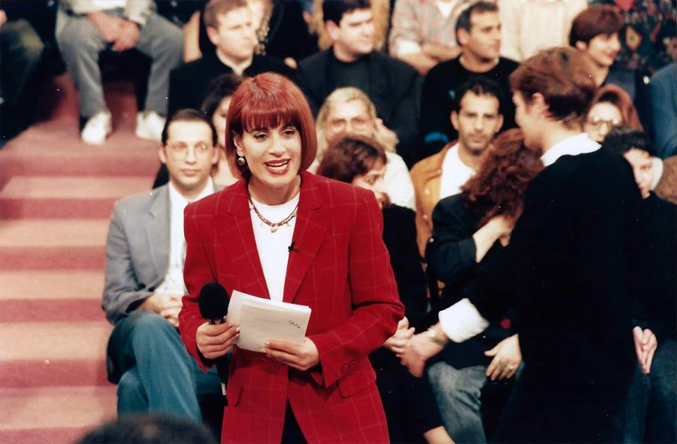 רובי פורת שובל מנחה בתכנית הטלוויזיה "רובי"